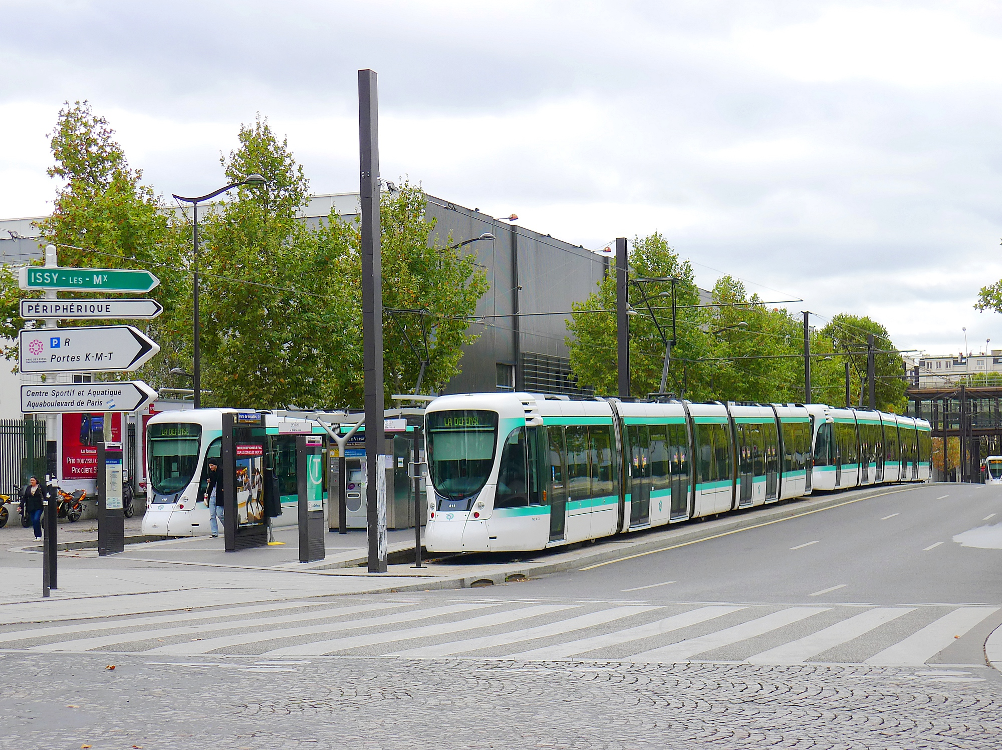 Avenue Ernest-Renan, porte de Versailles - Paris XVTramways de la ligne T2